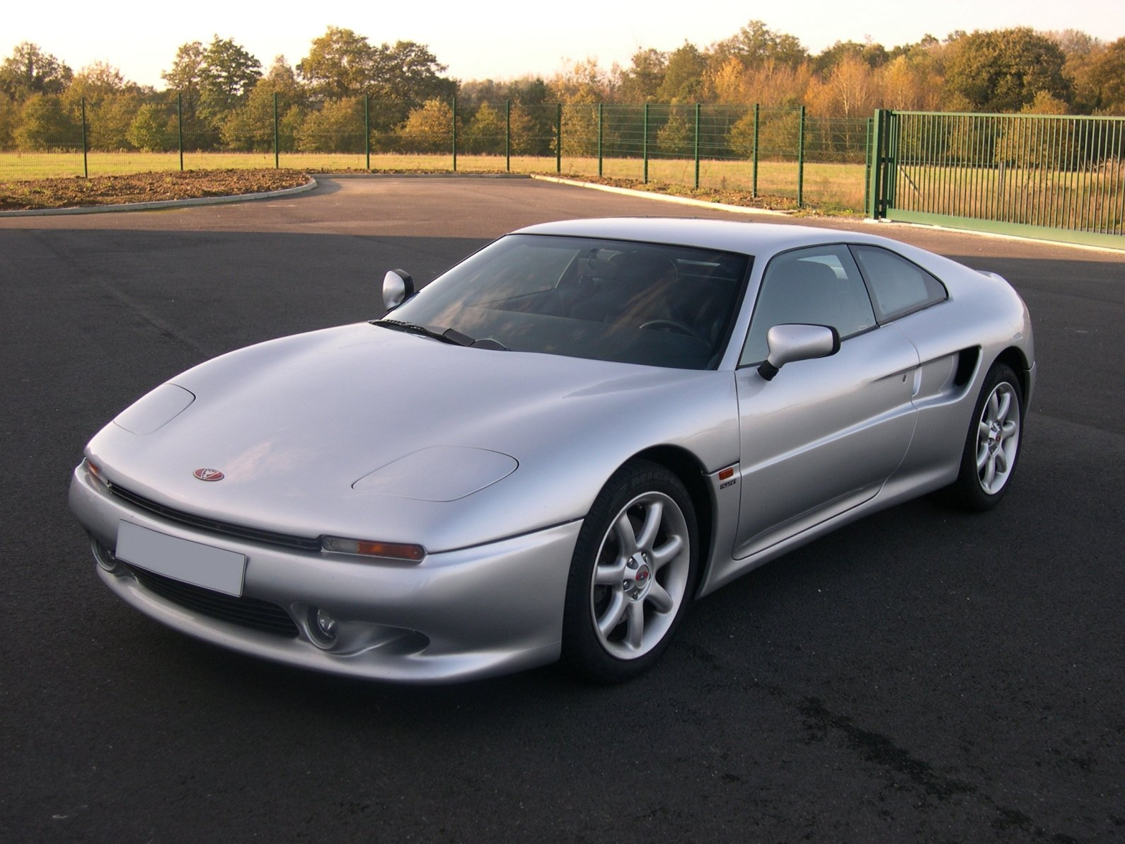 Venturi 300 Atlantique 3/4 Front French sport car